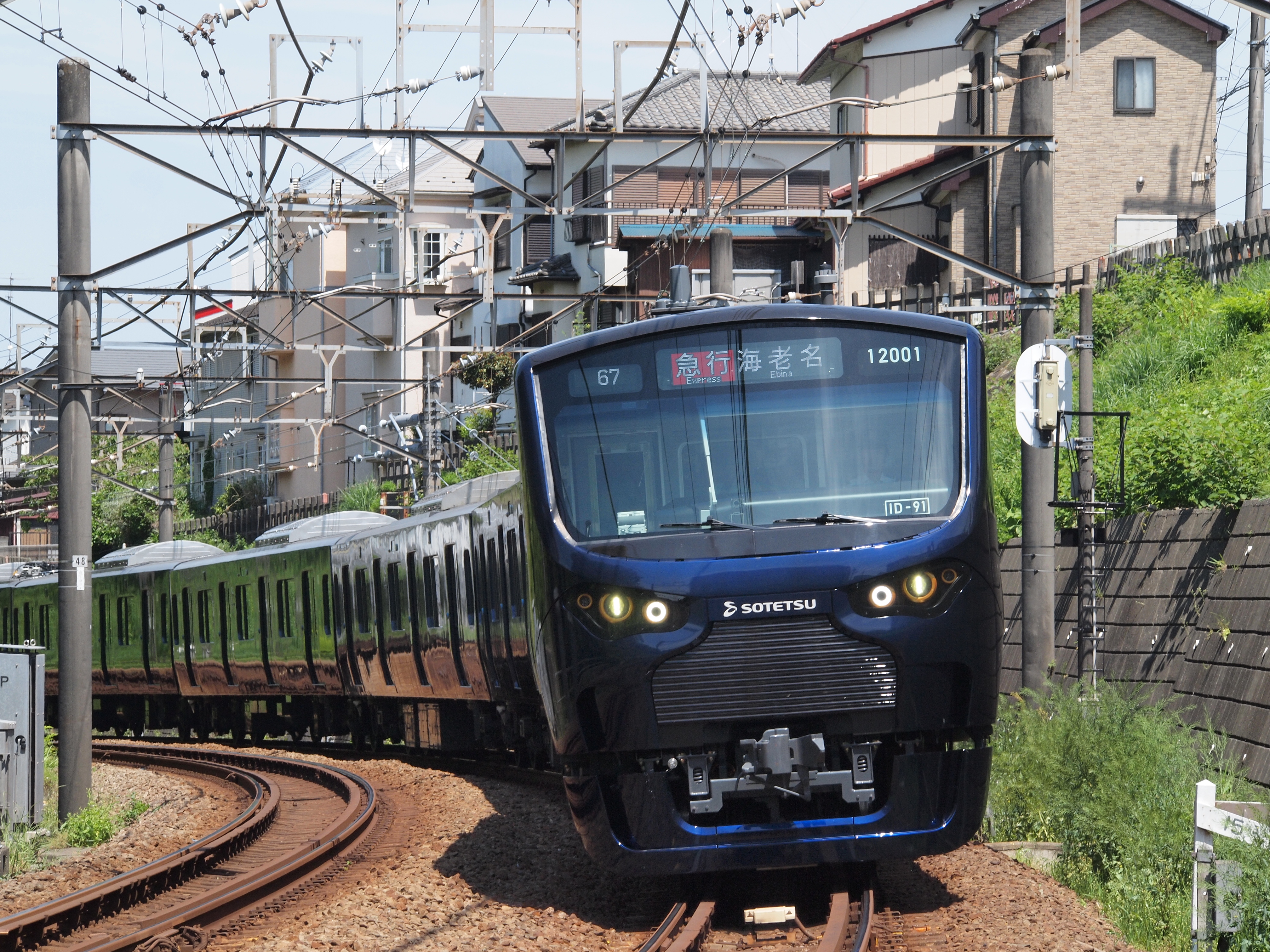 鶴ヶ峰駅を通過する急行運用の12000系電車。 Olympus E-P2